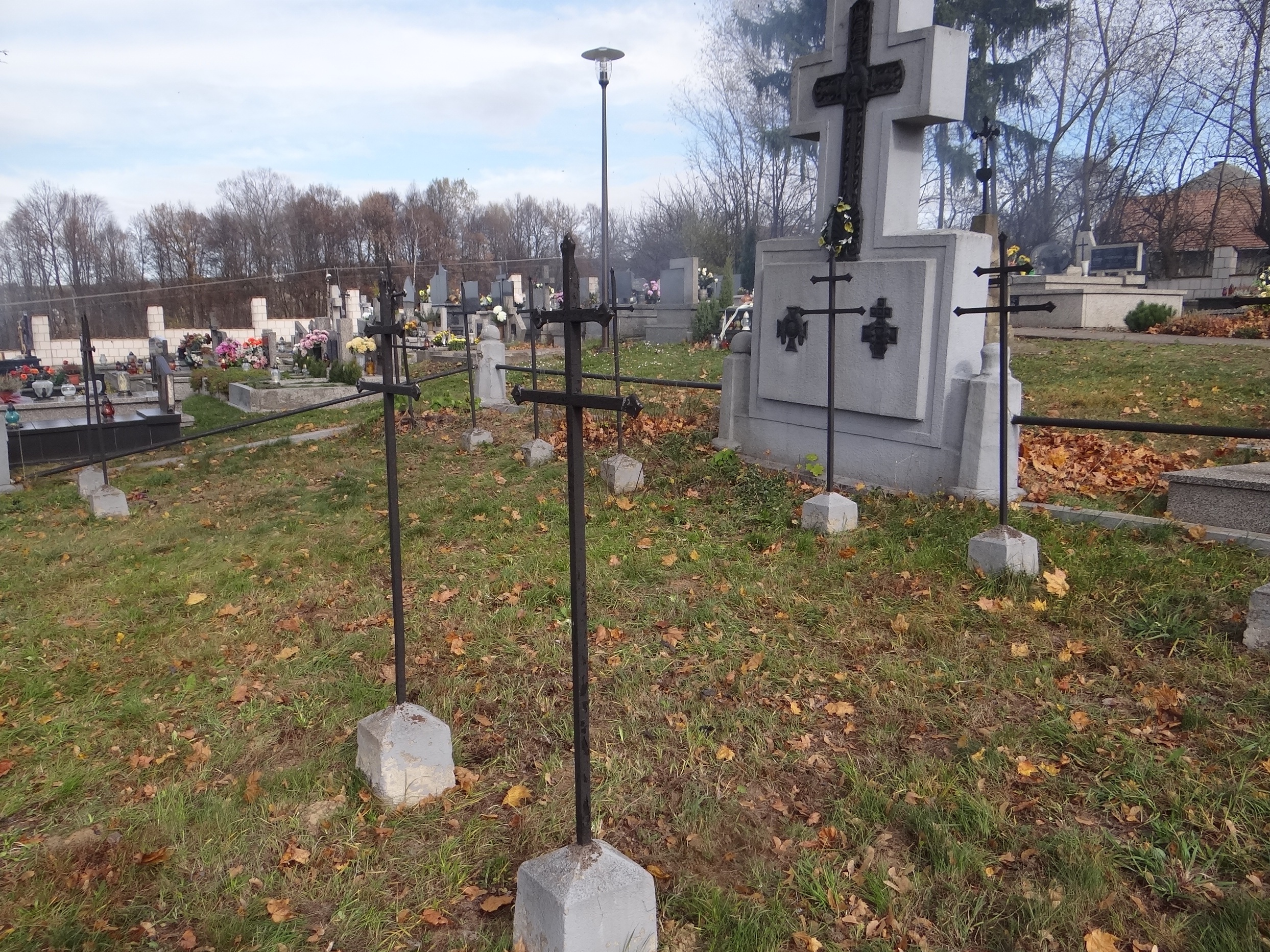 Cmentarz wojenny nr 344 - Tarnawa